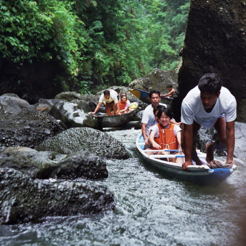 Bootsfahrt zu den Pagsanjan Falls, Ausflug während der Schacholympiade 1992 in Manila.